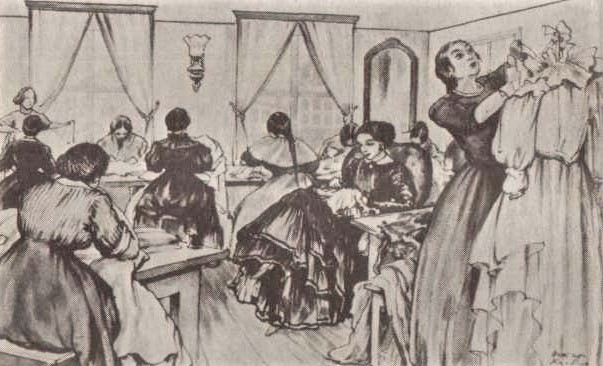 "Il laboratorio di Vera Pavlovna", illustrazione di autore non identificato